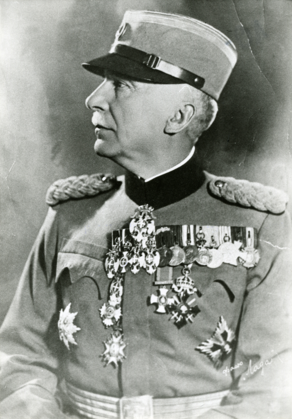 Бригадни генерал Спасоје Тешић